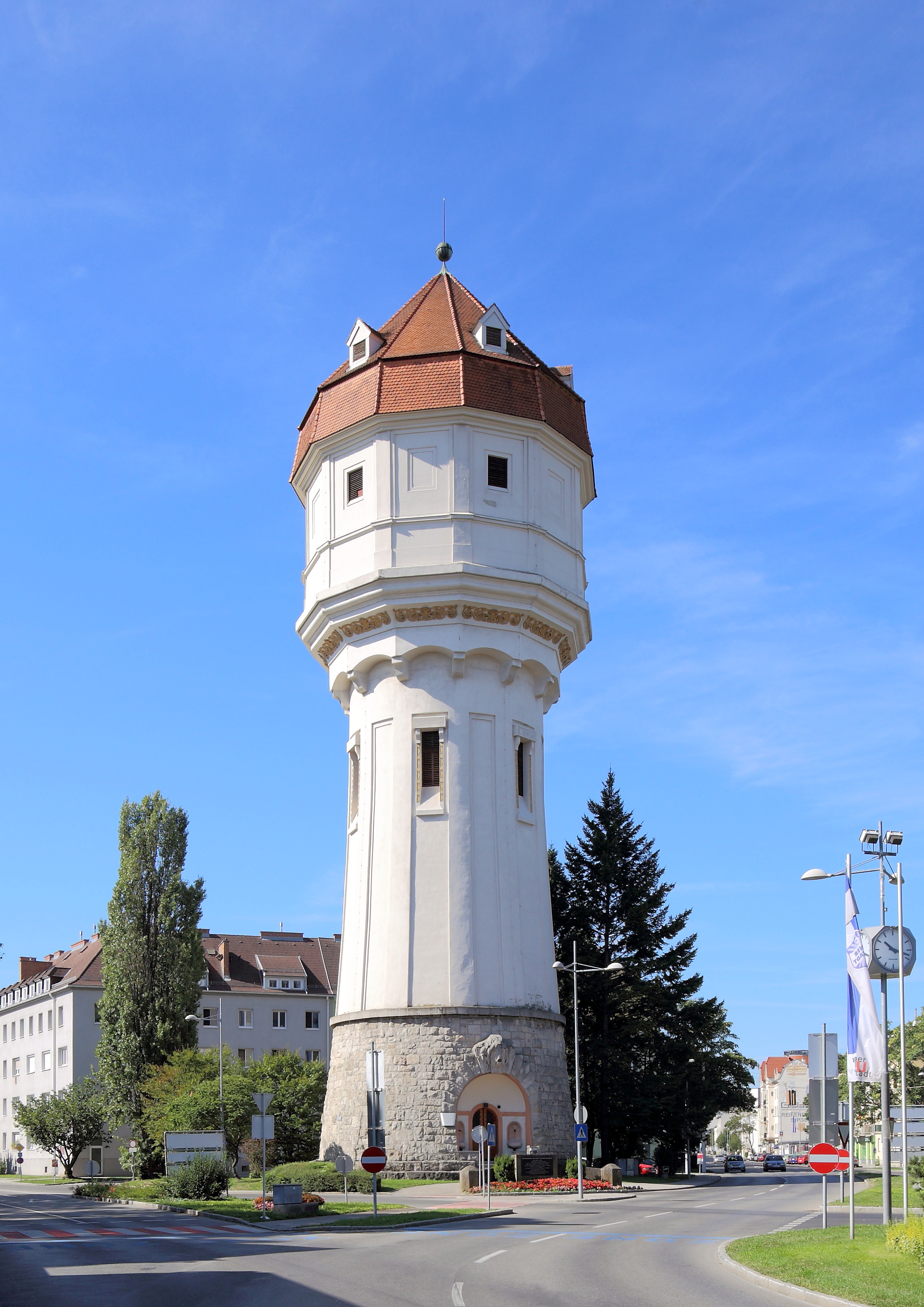 Nordostansicht des Wasserturmes der niederösterreichischen Stadt Wiener Neustadt. Der Wiener Neustädter Wasserturm wurde in den Jahre 1909/10 nach Plänen der Architekten Hans Jaksch und Siegfried Theiss vom Baumeister Anton Koblischek errichtet.